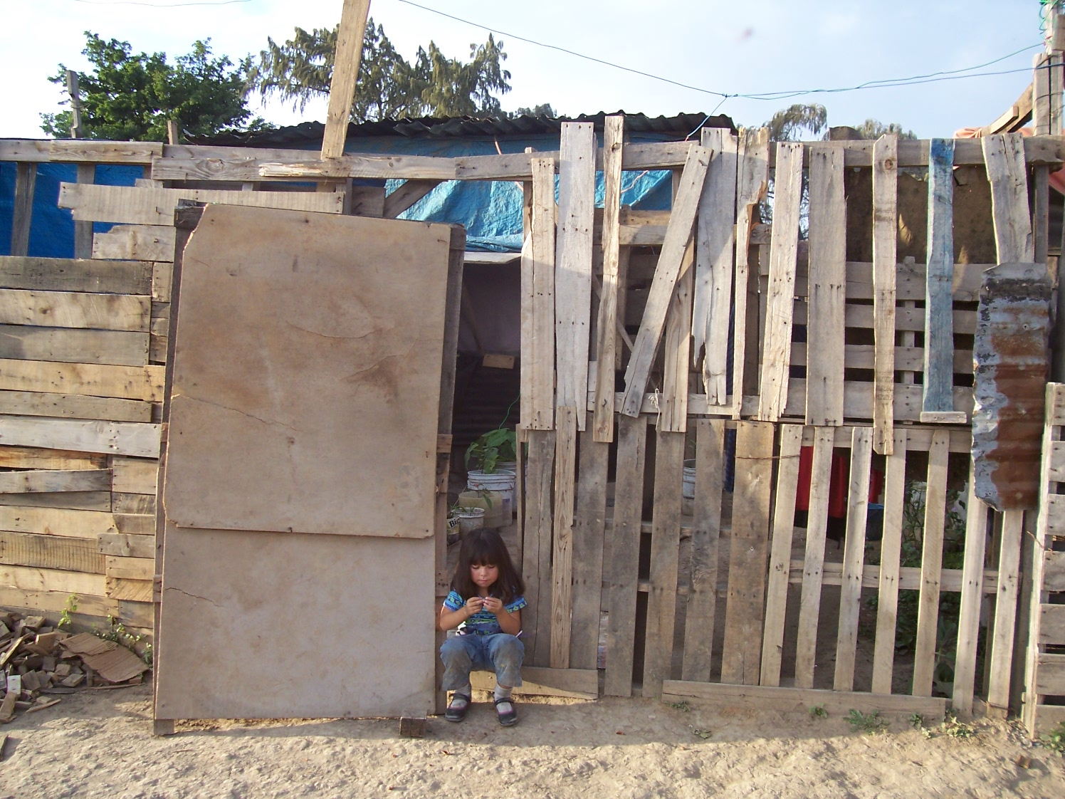 Asentamiento marginado "Colinas del Río", en el municipio Benito Juárez del Estado de Nuevo León en México. Diciembre de 2005. Fotografía tomada por usuario LeCire Segregated settlement "Colinas del Río", in the municipality Benito Juárez of the State of Nuevo León in Mexico. December of 2005. Photography taken by user LeCire